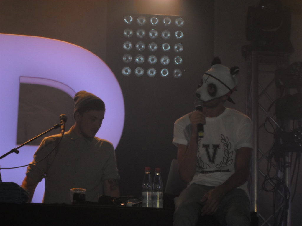 Cro und PSAIKO.DINO (links) in Hannover